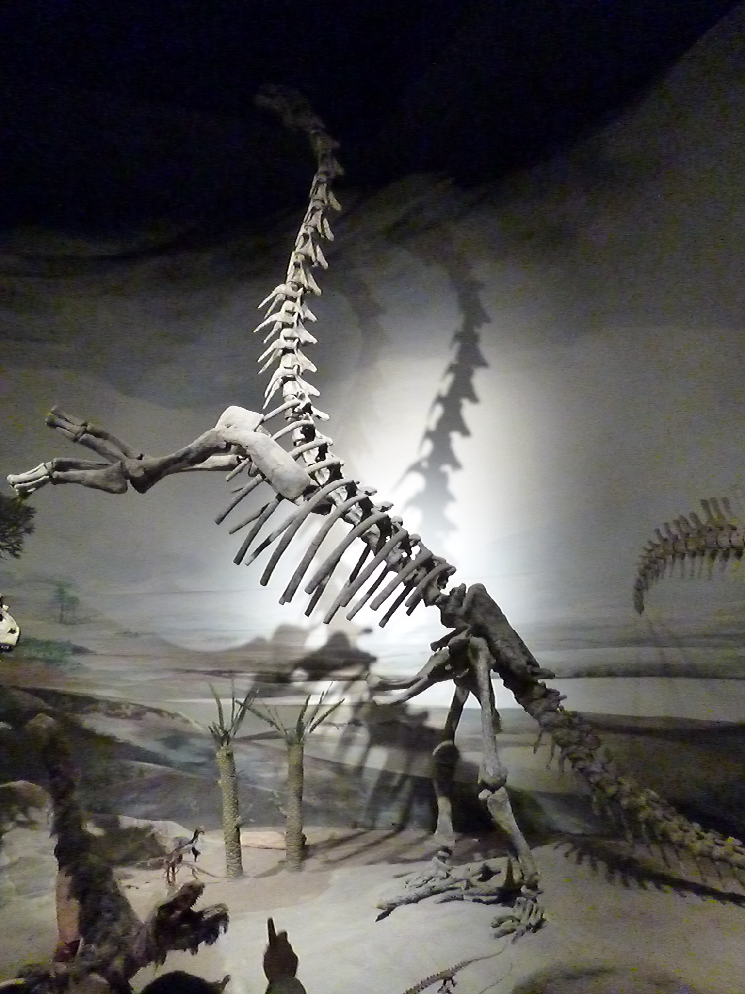 Museo Egidio Feruglio, Trelew. Esqueleto de un Epachtosaurus.